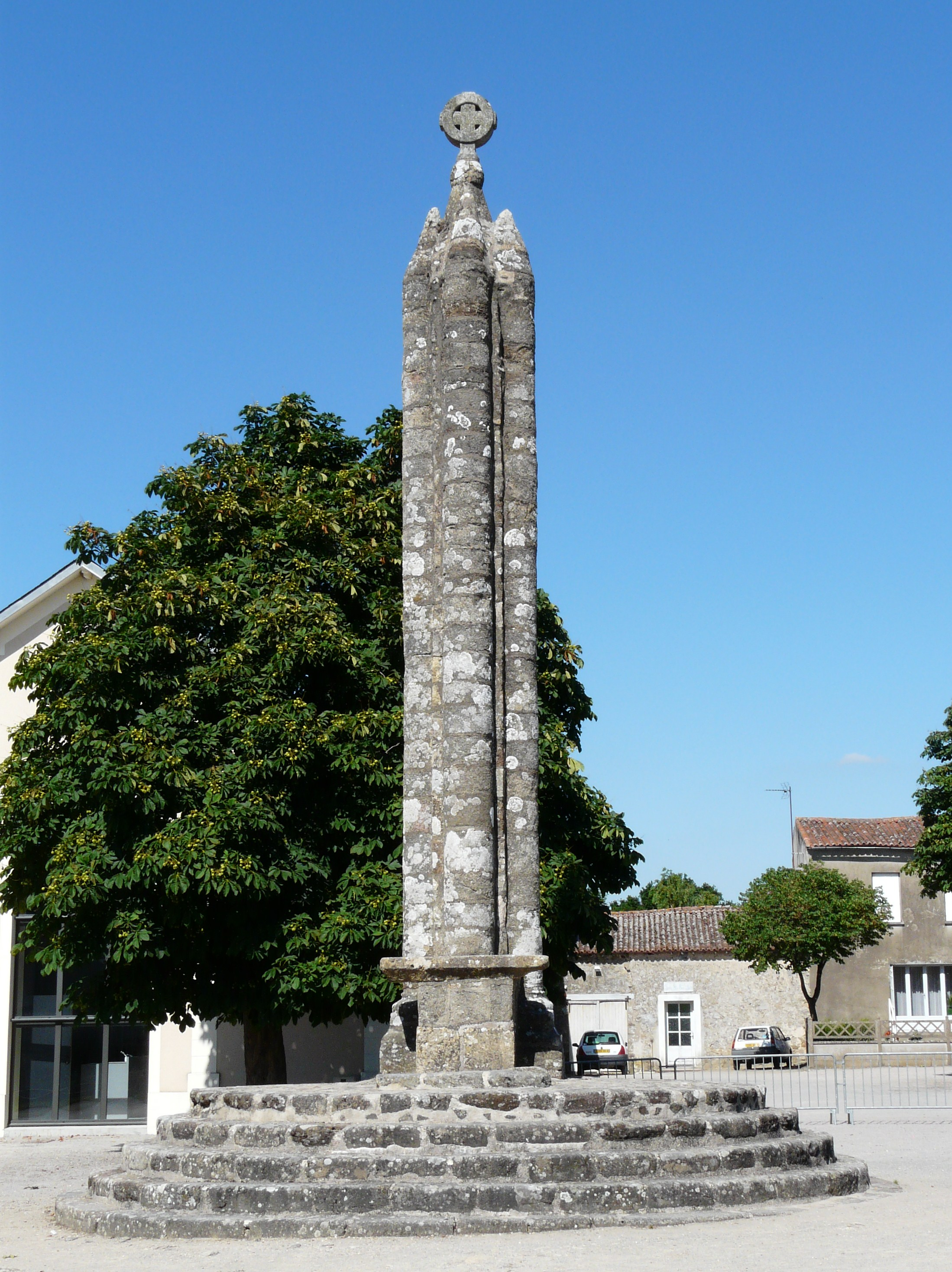 Croix hosannière, La Peyratte, Deux-Sèvres, France